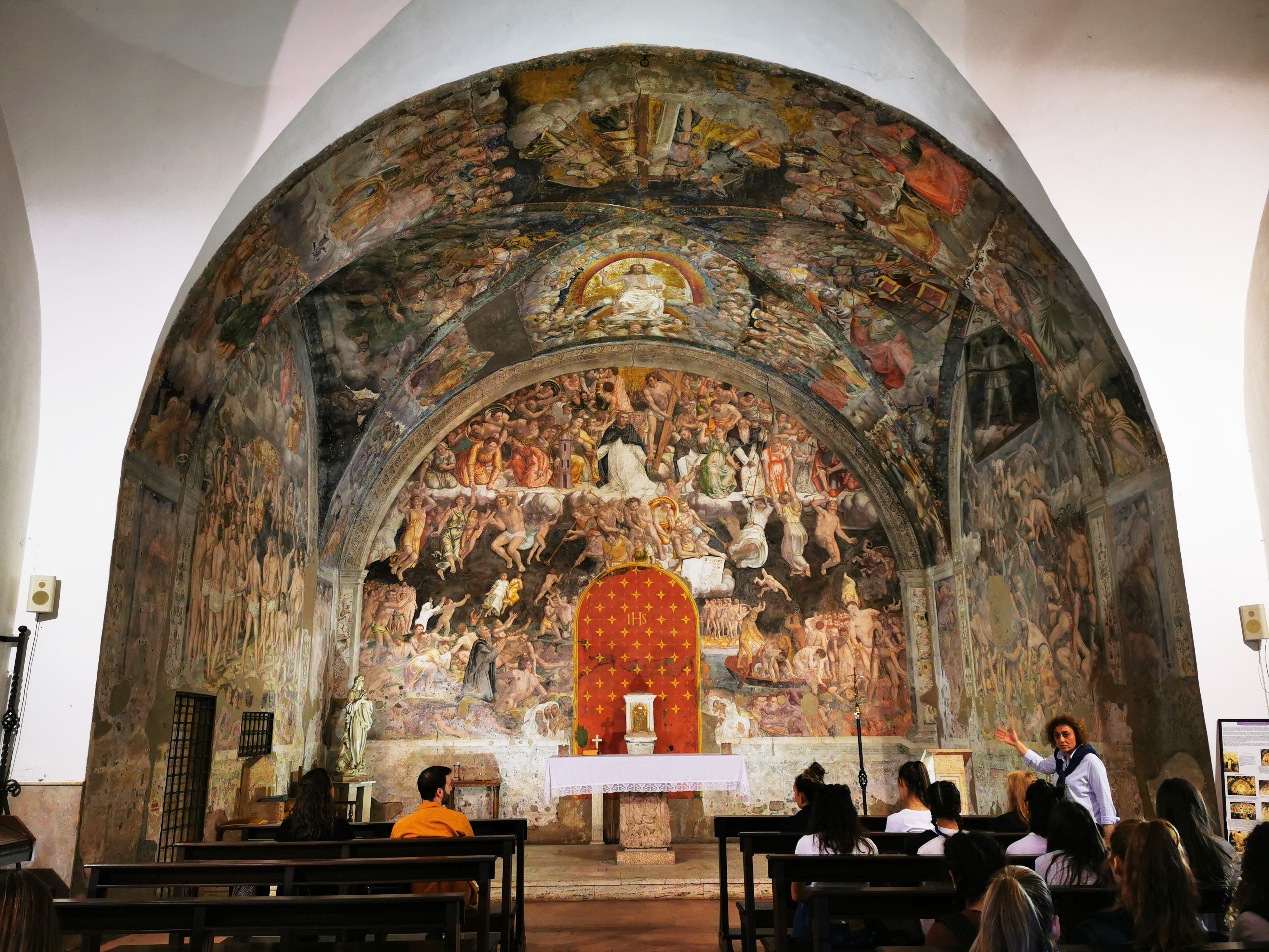 Oratorio di San Pietro Martire in occasione della WikiGita organizzata da "La Valle del Primo Presepe" del 21/09/2019. Affresco:"Giudizio Universale" dei fratelli Torresani. This is a photo of a monument which is part of cultural heritage of Italy. Questa è una foto di un bene culturale italiano che partecipa al concorso Wiki Loves Valle del Primo Presepe 2019, gestito in coperazione con Wikimedia Italia. This is a photo of a monument which is part of cultural heritage of Italy. This monument participates in the contest Wiki Loves Valle del Primo Presepe 2019, operated in cooperation with Wikimedia Italia.